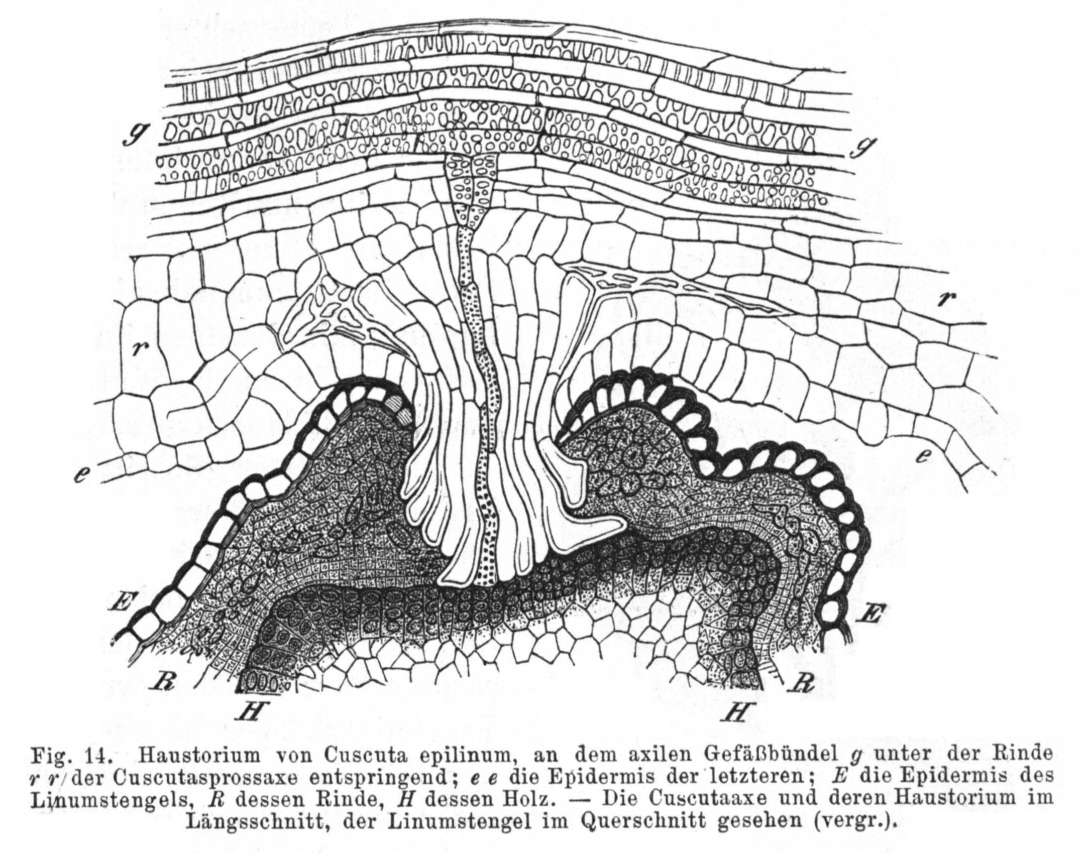 Haustorium von Cuscuta epilinum an Linum usitatissimum. Haustorium im Längsschnitt, Leinstängel im Querschnitt. Cuscuta: e = Epidermis, r = Rinde, g = Gefäßbündel. Lein: E = Epidermis, R = Rinde + Bast, H = Holz.